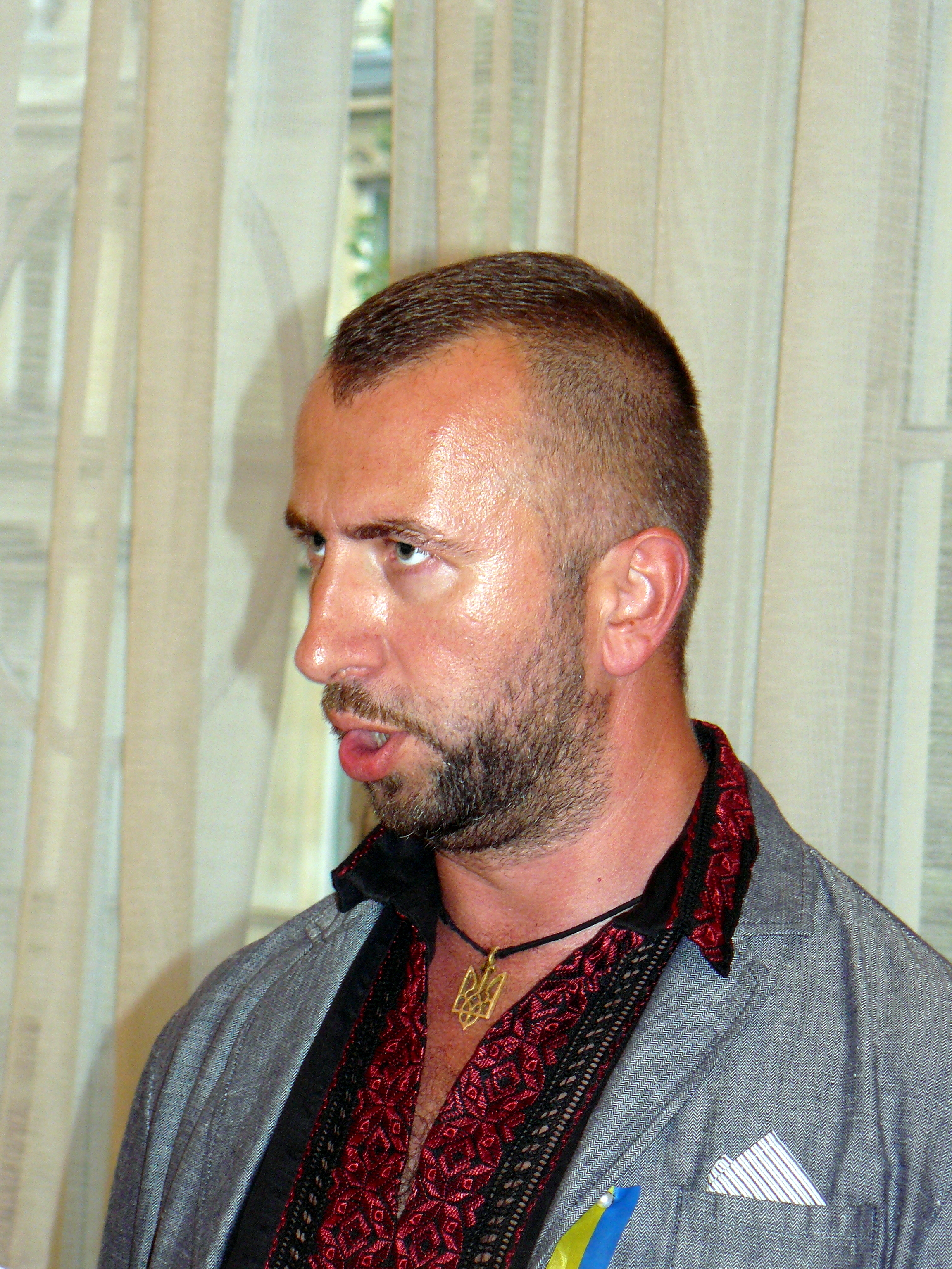 Wassyl Slipak, chanteur d'opéra ukrainien, soliste de l'Opéra Bastille à Paris, tué au front dans le Donbass le 29 juin 2016. Photo prise à l'Institut Culturel Ukrainien de Paris le 27 juin 2014.